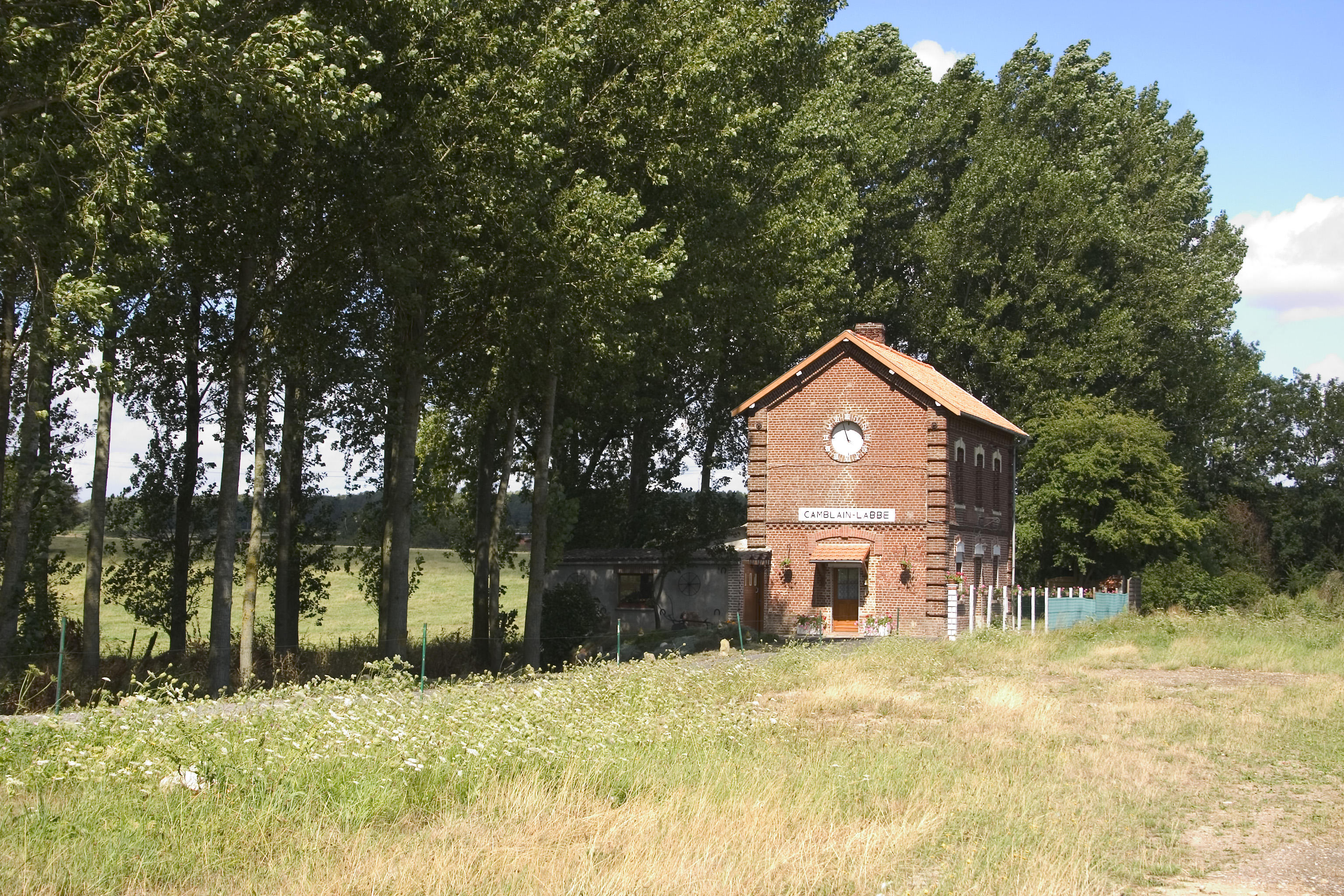 L'ancienne gare de Comblain-l'Abbé (ligne Lens Frévent)